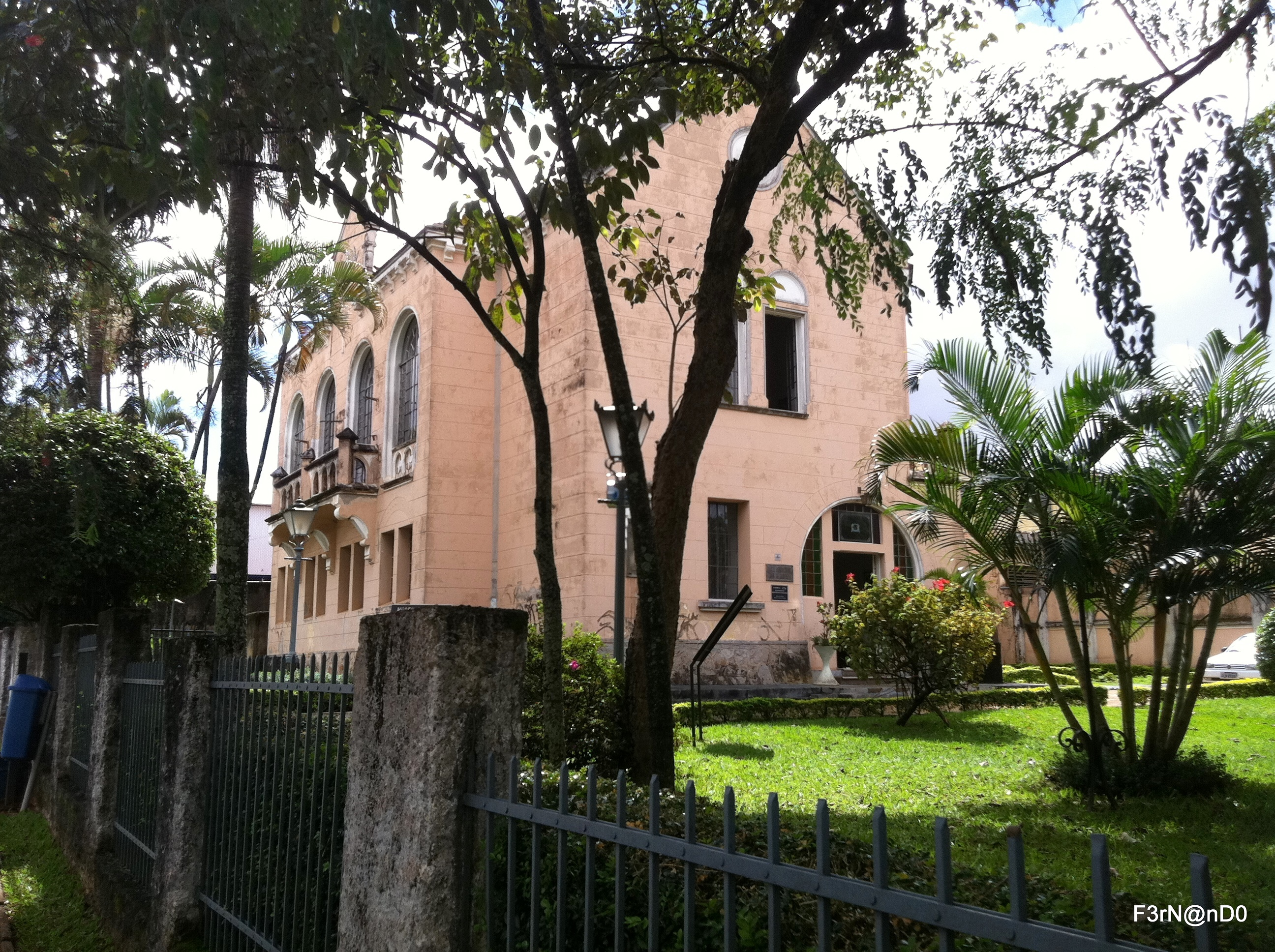 Centro, Franca - São Paulo, Brasil